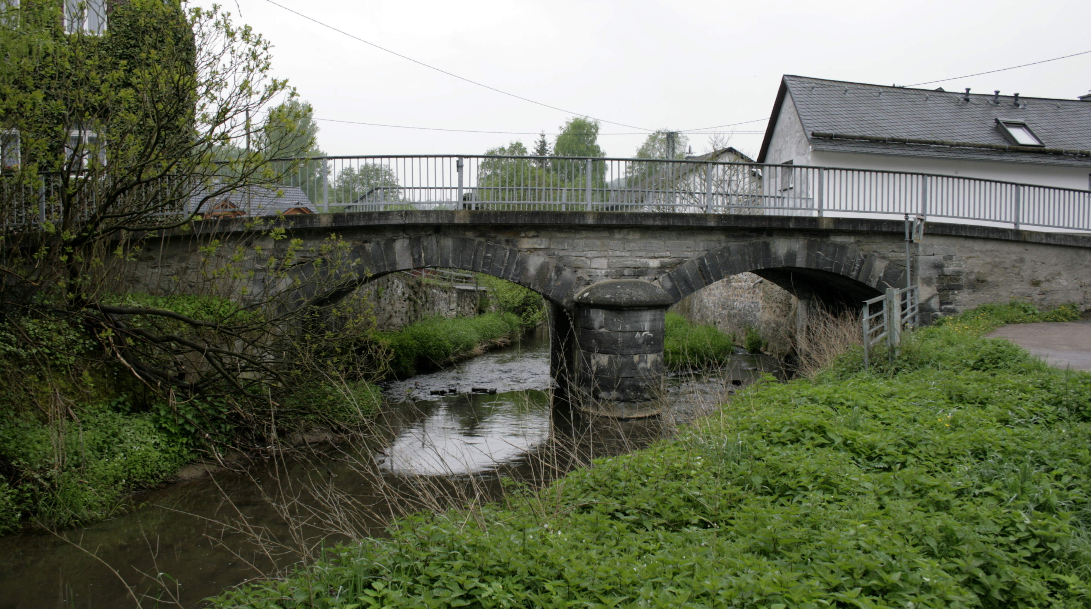 Brücke über den Kerkerbach in Runkel-Eschenau, Deutschland